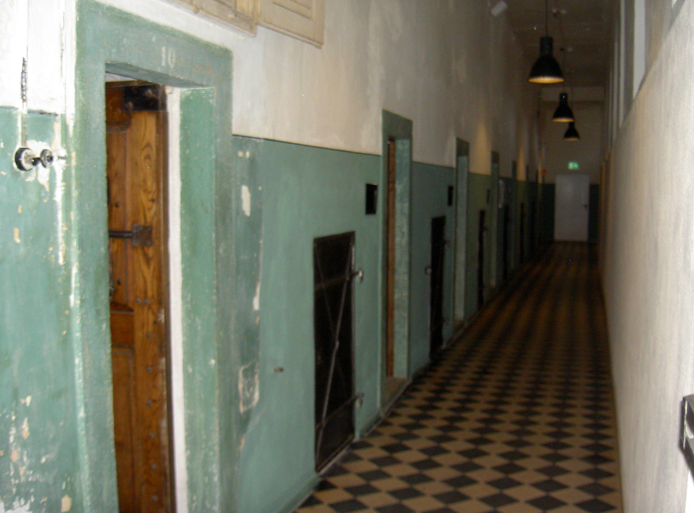 Amberg Fronfeste, ehemaliges Gefängnis, heute Hotel